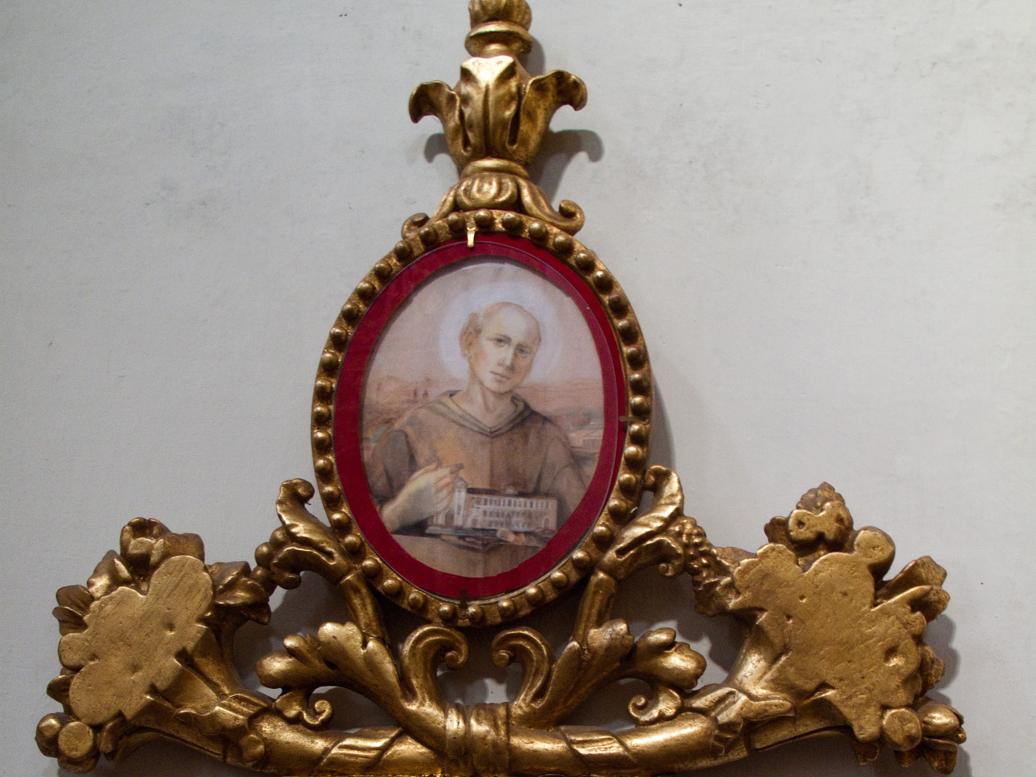 Vicenza - Chiesa di San Giuliano - Marco da Montegallo